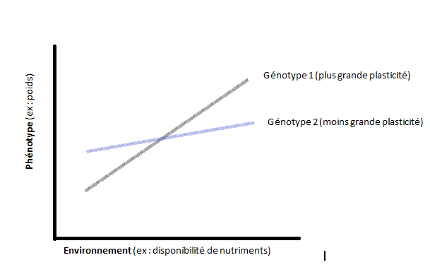 Les lignes représentent la variation phénotypique selon un gradient environnementale de chaque génotype. On remarque que le génotype 1 a une plus grande plasticité que le génotype 2.